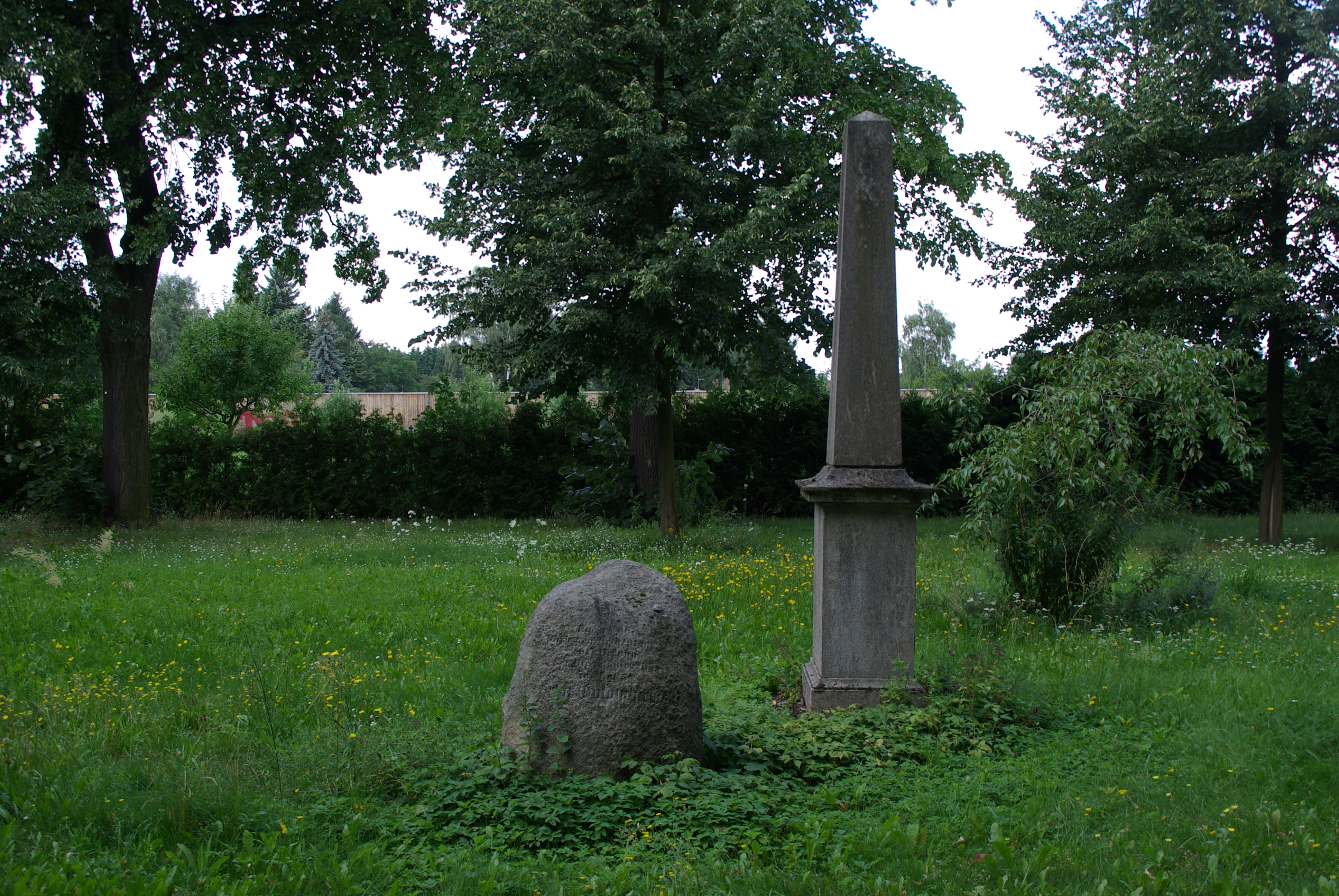 Städtischer Friedhof Altglienicke, eine Stele und ein Grabmal hinter der Kapelle